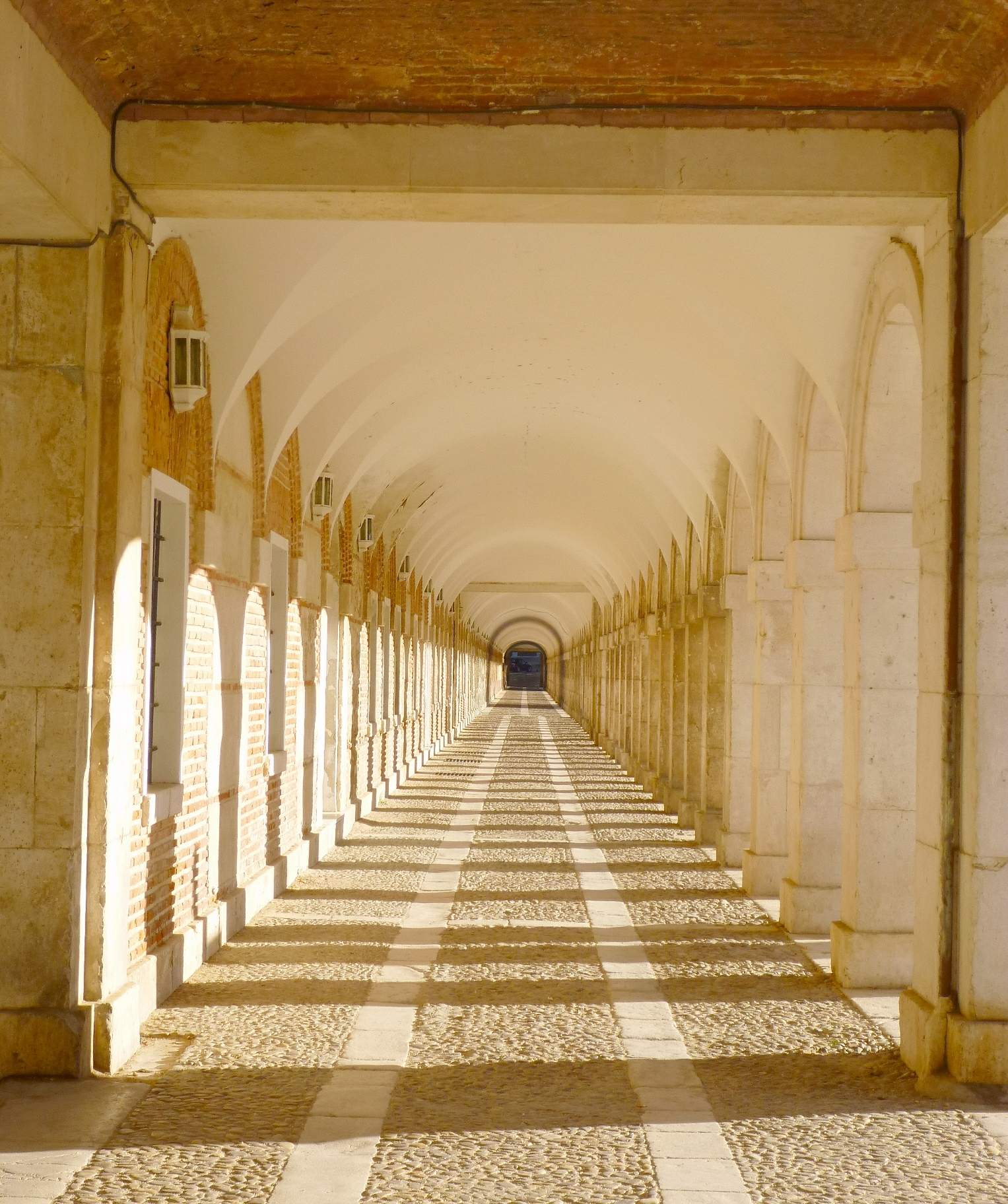 Casa de Caballeros y Oficios, Real Sitio de Aranjuez